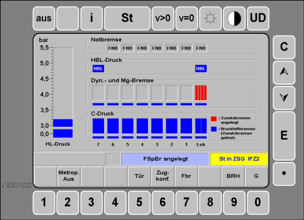 Davisrechner Display im Metropolitansteuerwagen als Führerraumbremsbild